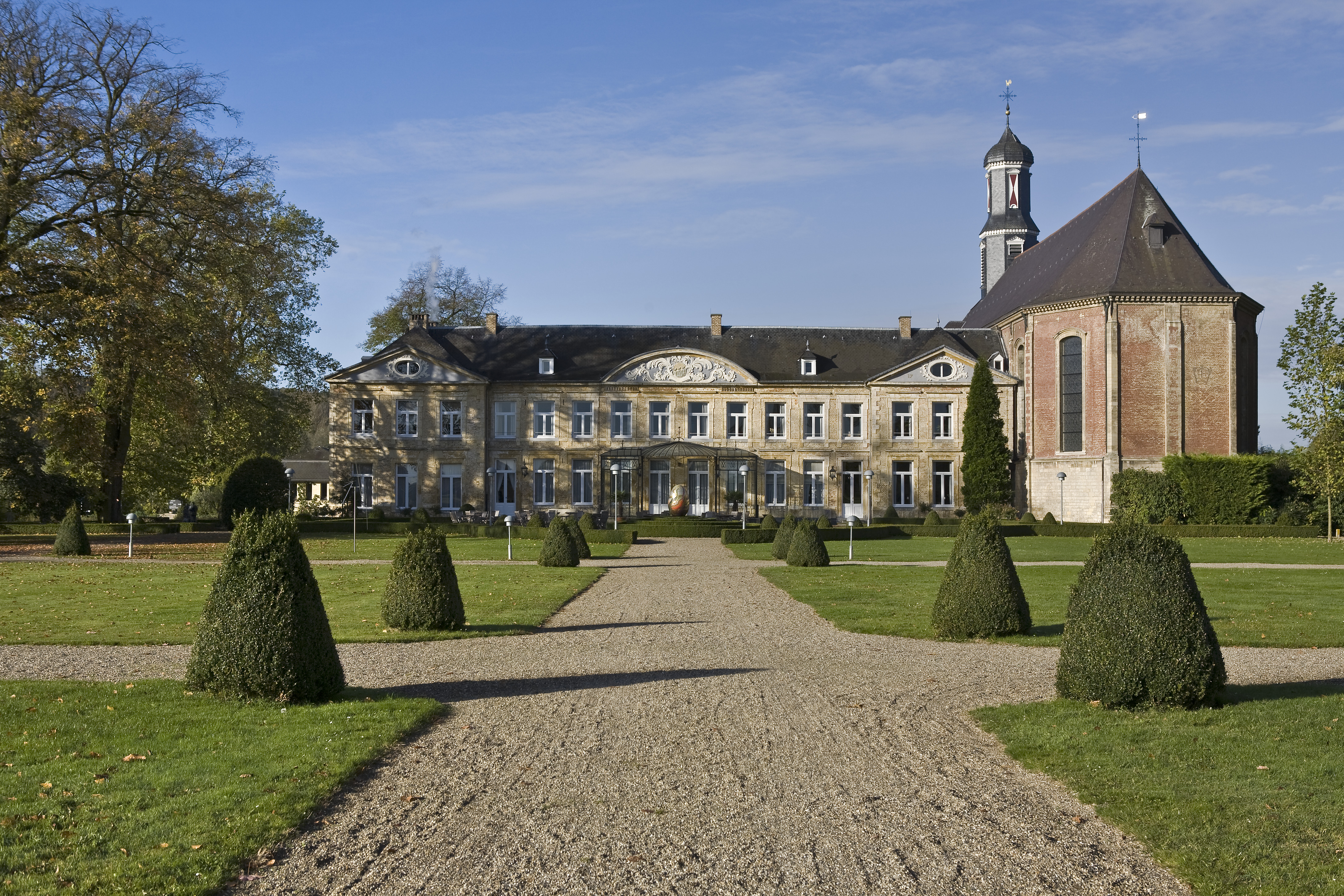 Kasteel Van Sint Gerlach: Overzicht voorgevel Proostenhuis met rechts de kerk (opmerking: Gefotografeerd voor publikatie voor het boek Heiligdom / Sanctuary Sint Gerlach.)